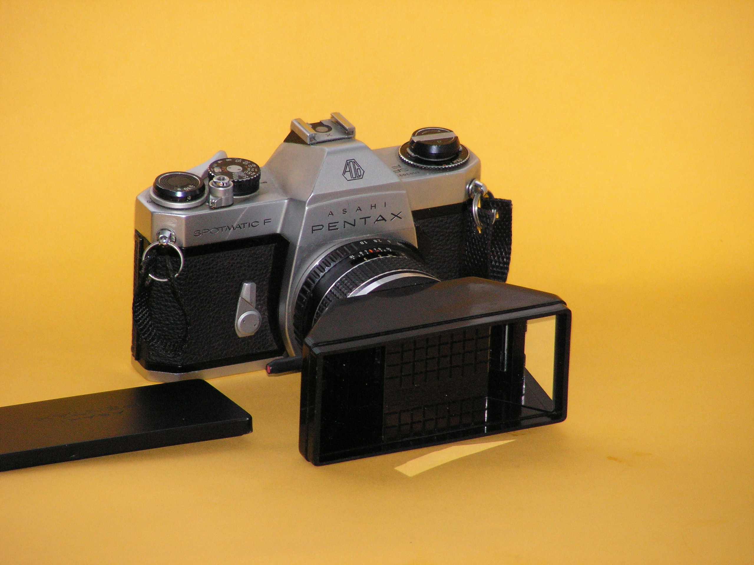 foto stefan linder